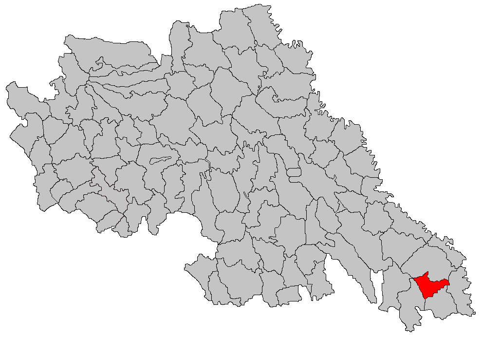 Categorie:Hărţi ale judeţului Iaşi